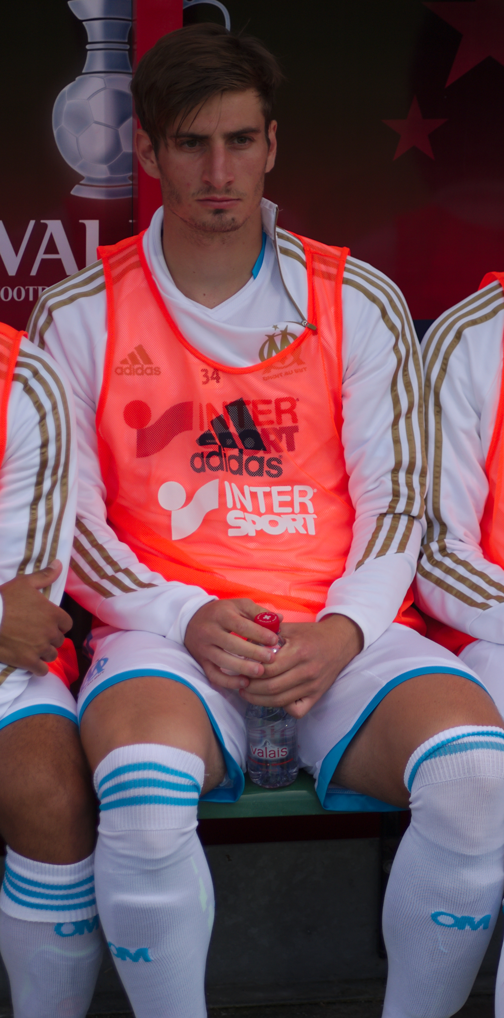 Valais Cup 2013 - OM-FC Porto - 20130713 - Baptiste Aloé